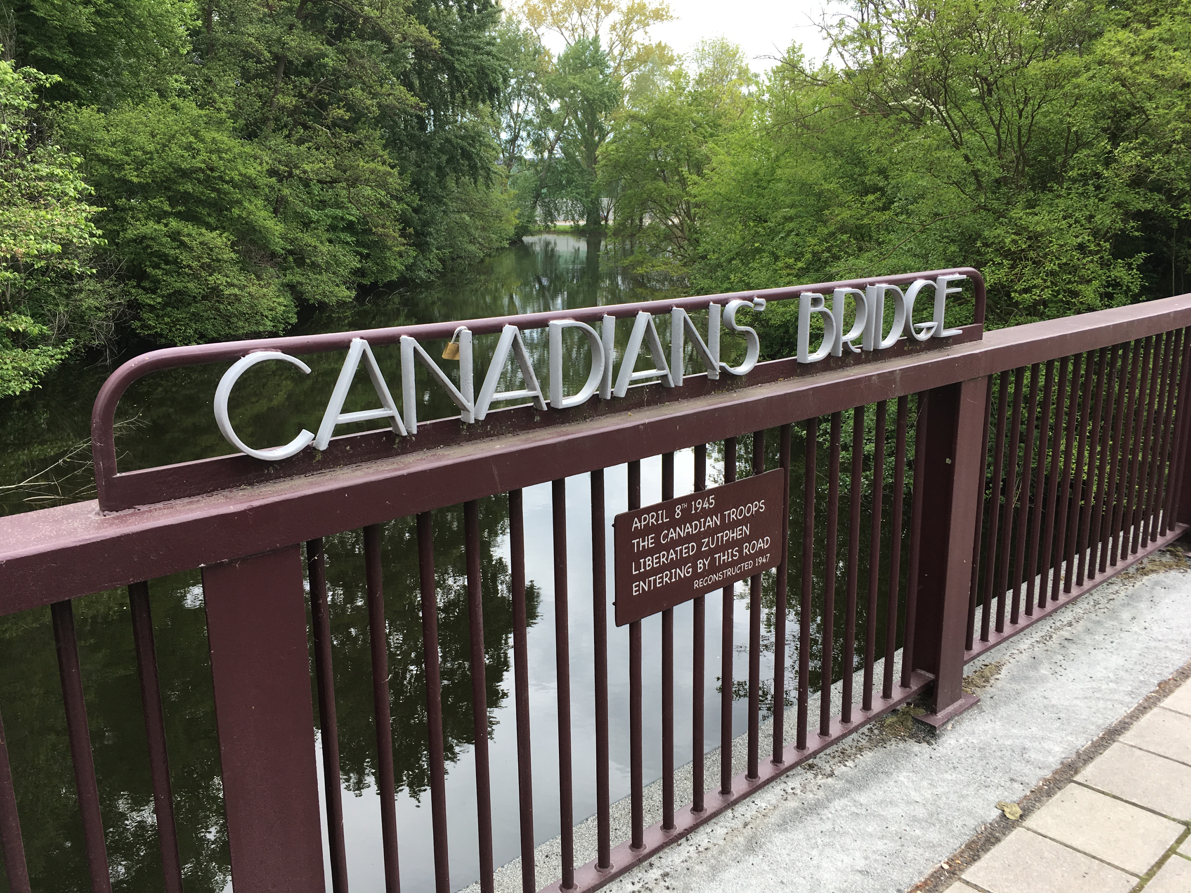 Foto van de Engelse tekst op de Canadezenbrug in Zutphen